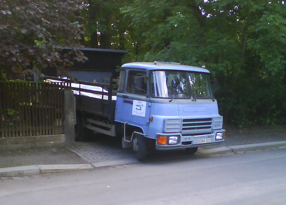 Robur LD 3004 in Dresden